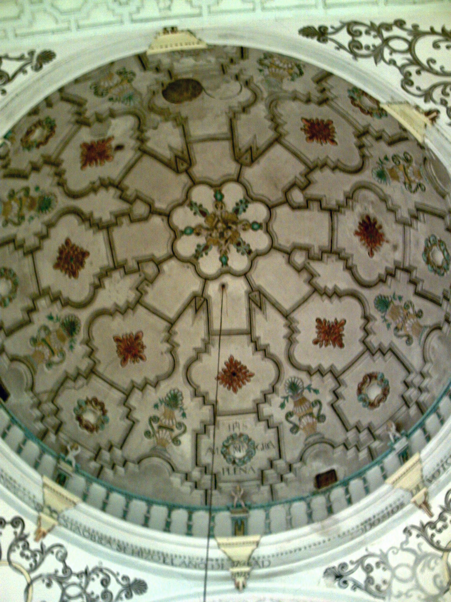 Cúpula decorada e yeso. Ermita de Revilla.